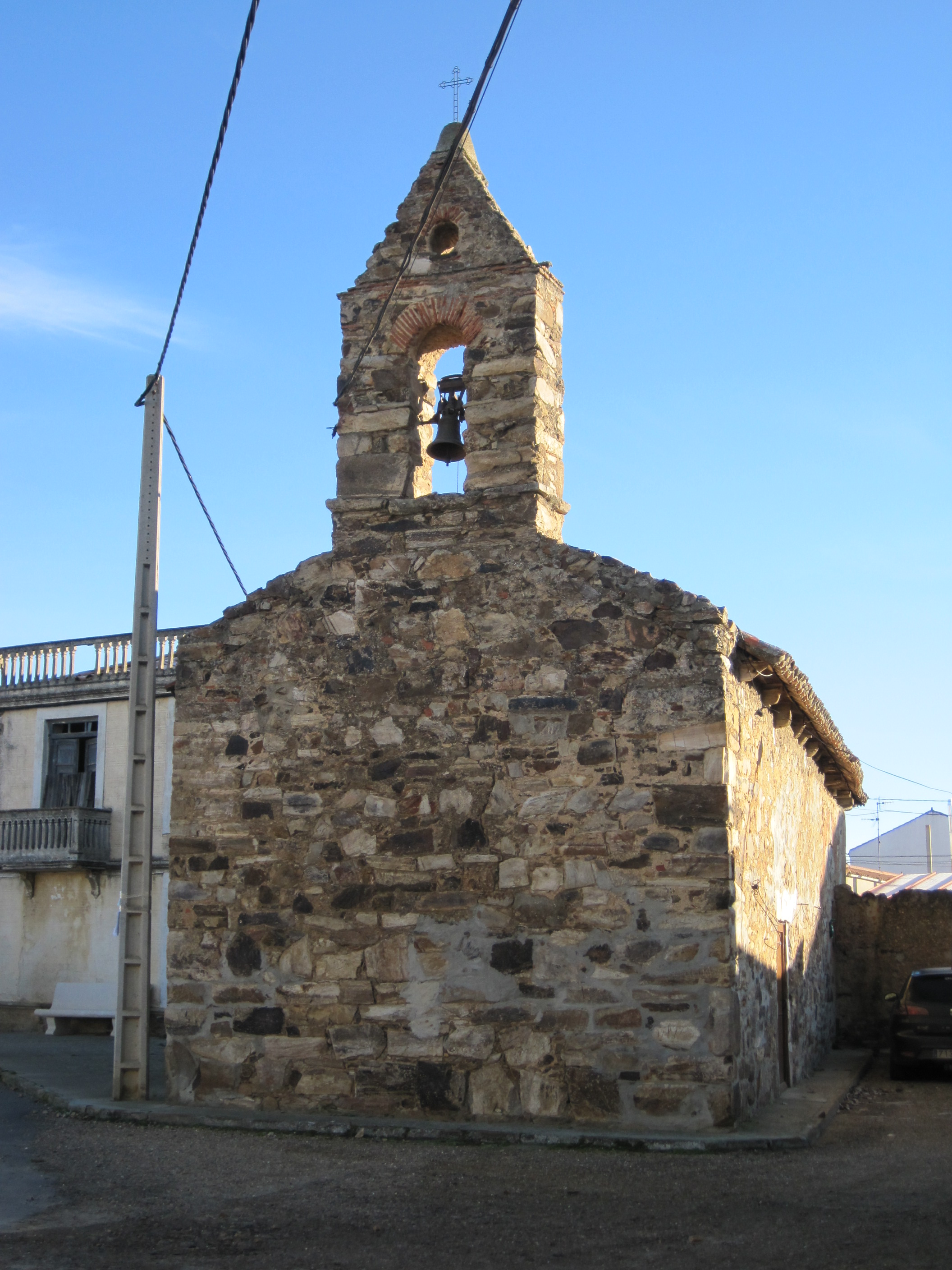 Ermita de San Roque en Palacios de la Valduerna (León, España).